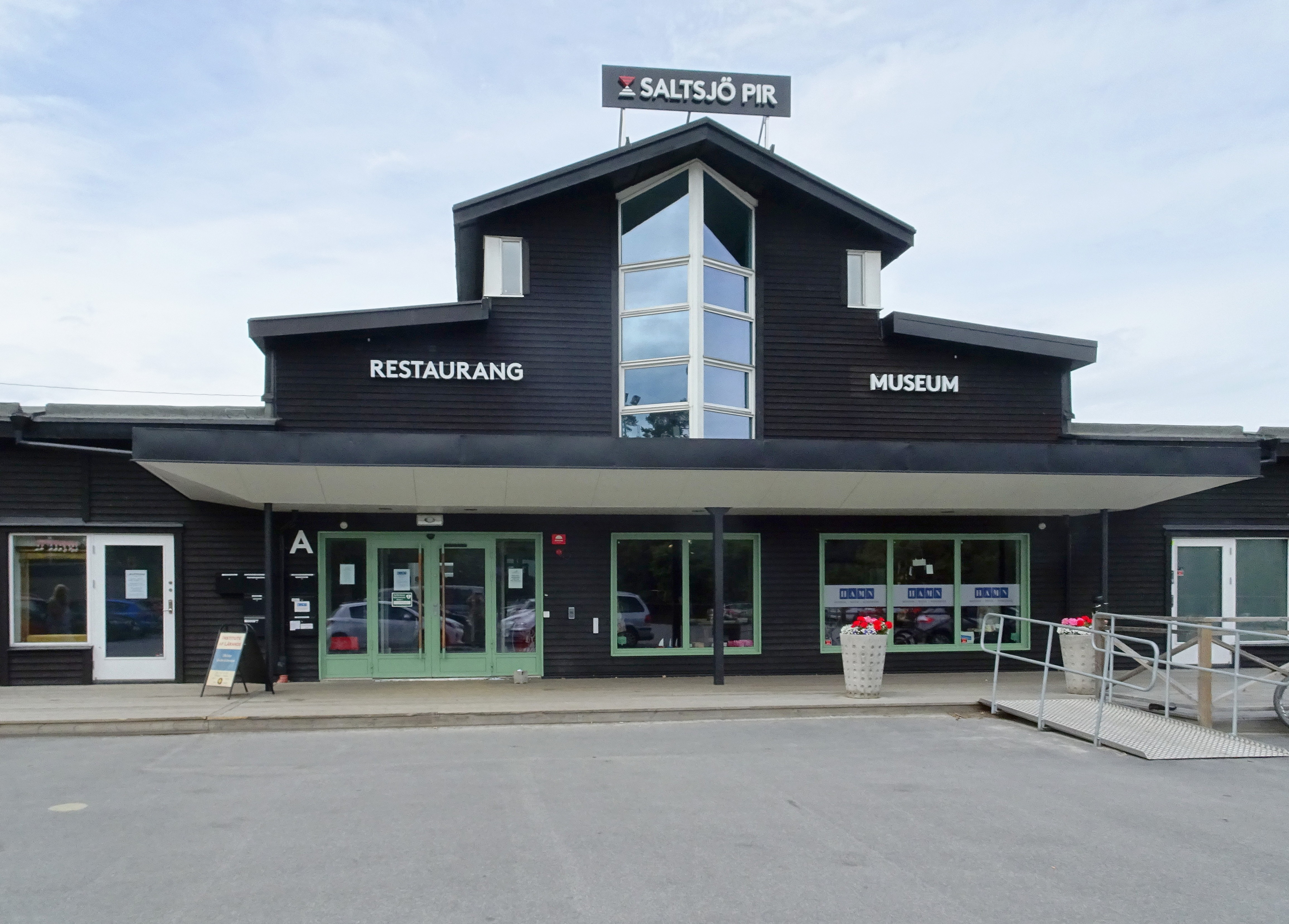 Historiearvsmuseet i Fisksätra